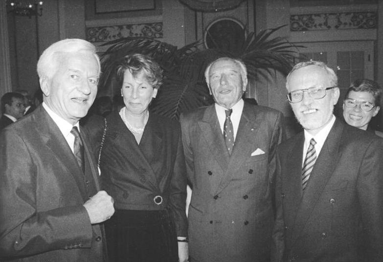 ADN/ Bernd Settnik- 3.10.80 Berlin: Vereinigung Bundespräsident Richard von Weizsäcker, Dr. Sabine Bergmann-Pohl, Alt-Bundespräsident Walter Scheel und Lothar de Maiziere (v.l.) kurz vor Beginn des Festaktes zum Tag der Deutschen Einheit am 2.10. im Schauspielhaus